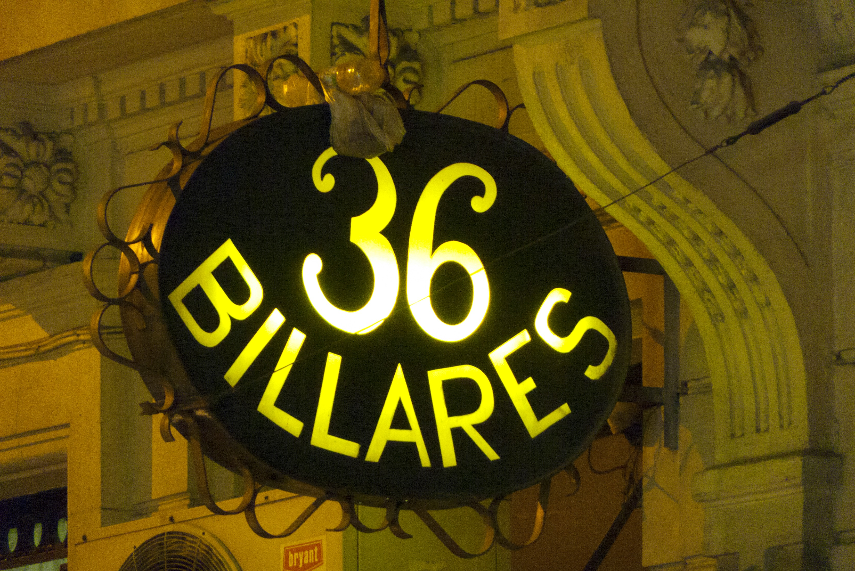 Vista nocturna del tradicional café porteño 36 Billares